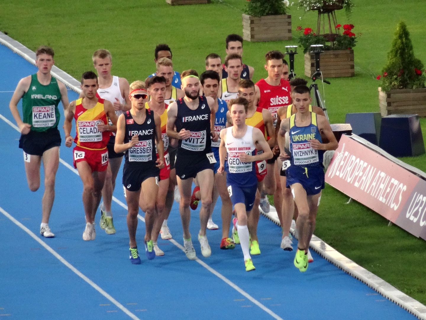 Młodzieżowe Mistrzostwa Europy w Lekkoatletyce U23 w Bydgoszczy 13-16 lipca 2017, bieg na 5000 m mężczyzn